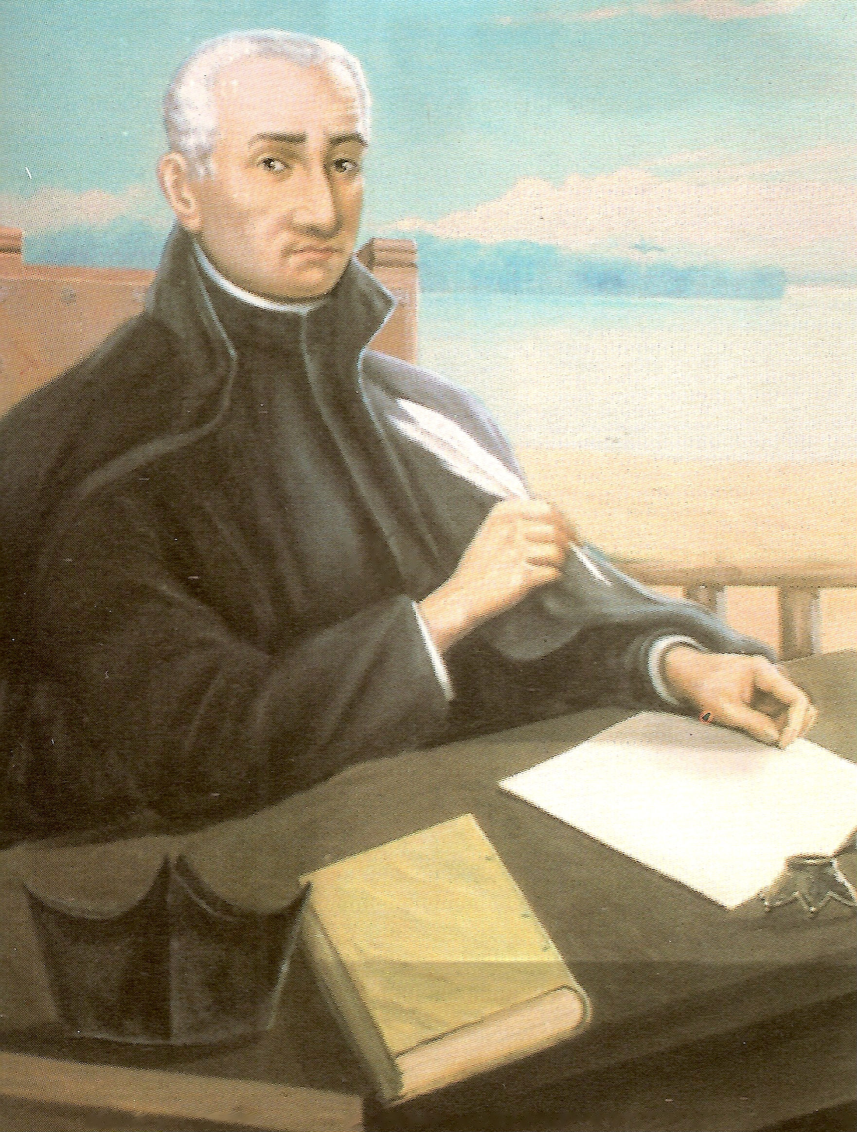 Anónimo: padre José Gumilla. siglo XVIII. Óleo/Tela